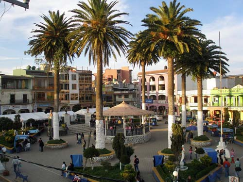 Centro de Zacualtipán